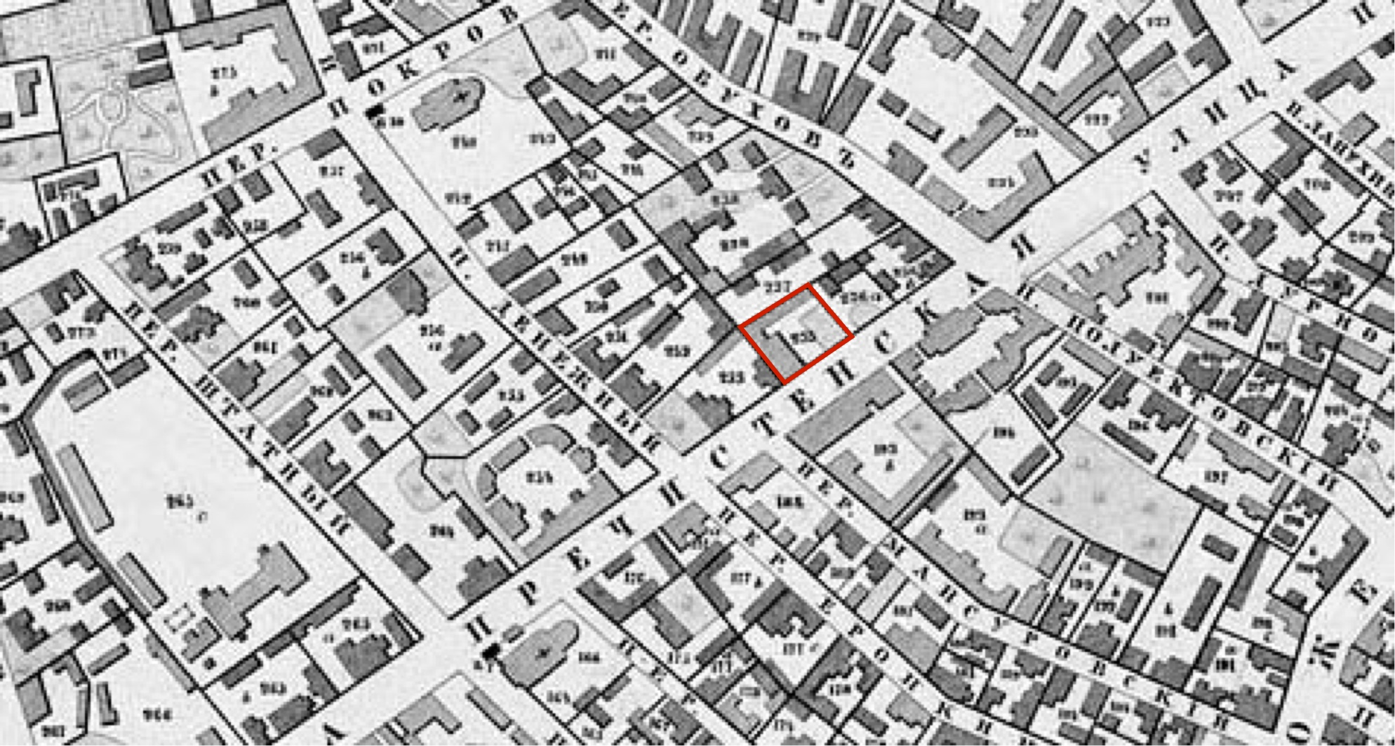 Владение № 28 по Пречистенке на плане Москвы Хотева